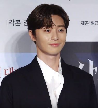 영화 '사자' 제작보고회가 26일 오전 서울 광진구 자양동 롯데시네마 건대입구점에서 열렸다.